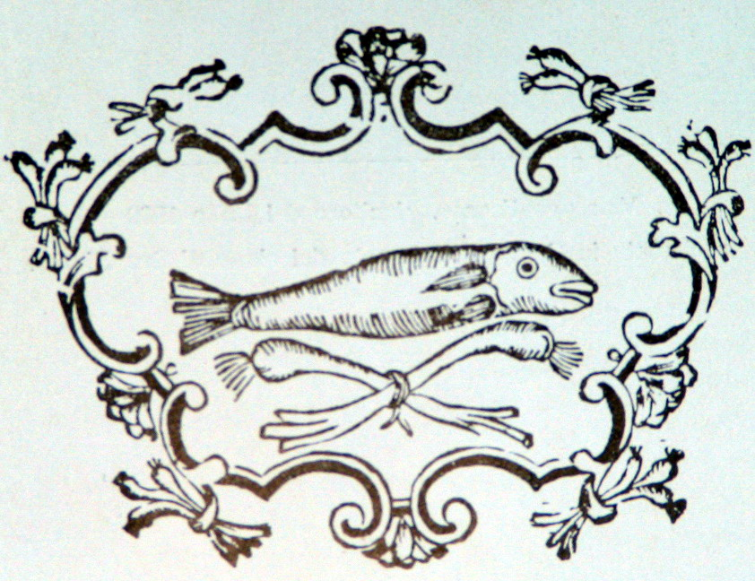 Palio di Asti, il premio dell'Inchioda ( acciuga), da una xilografia del settecento.